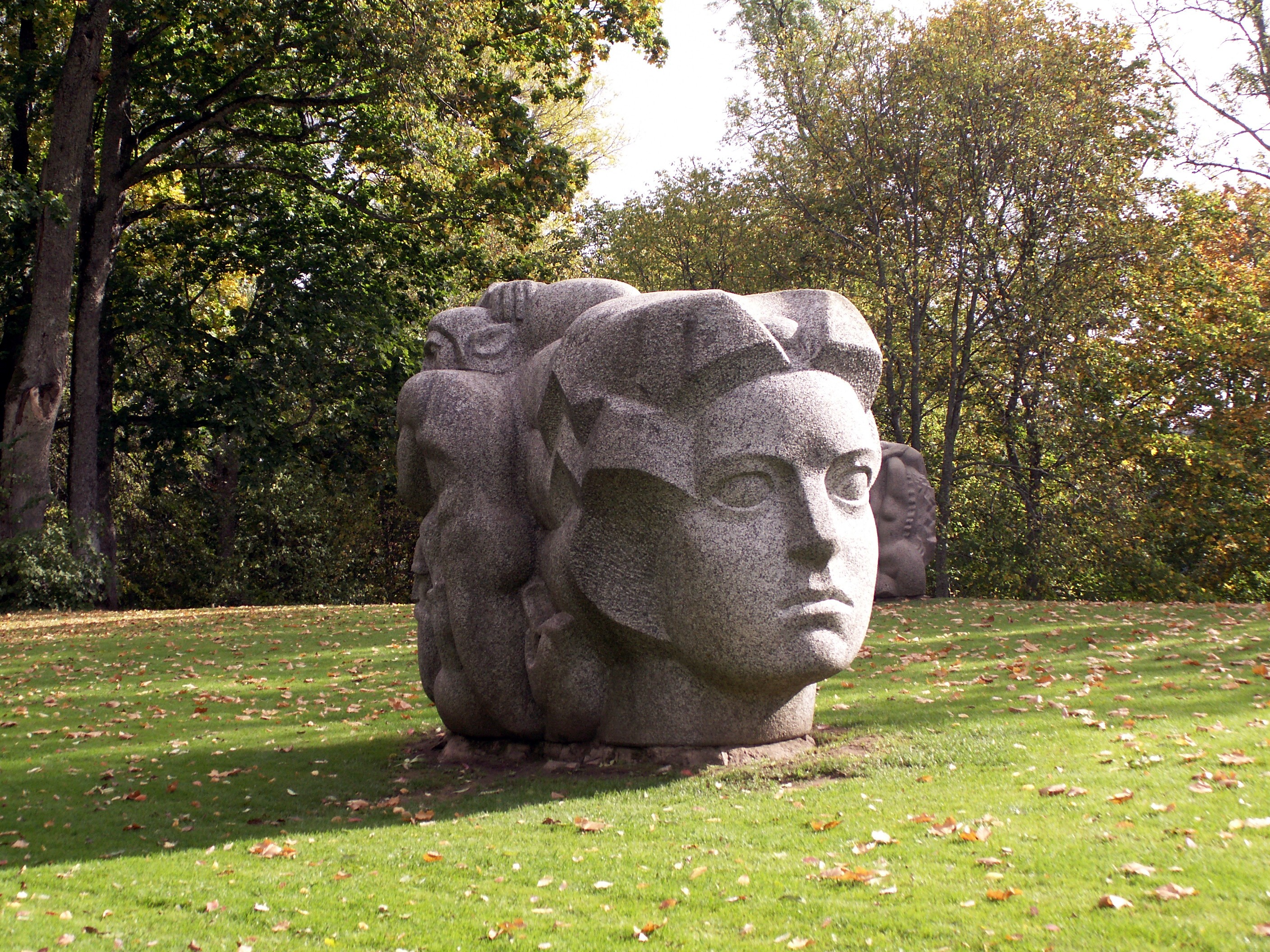 Dainų kalnas. Turaida